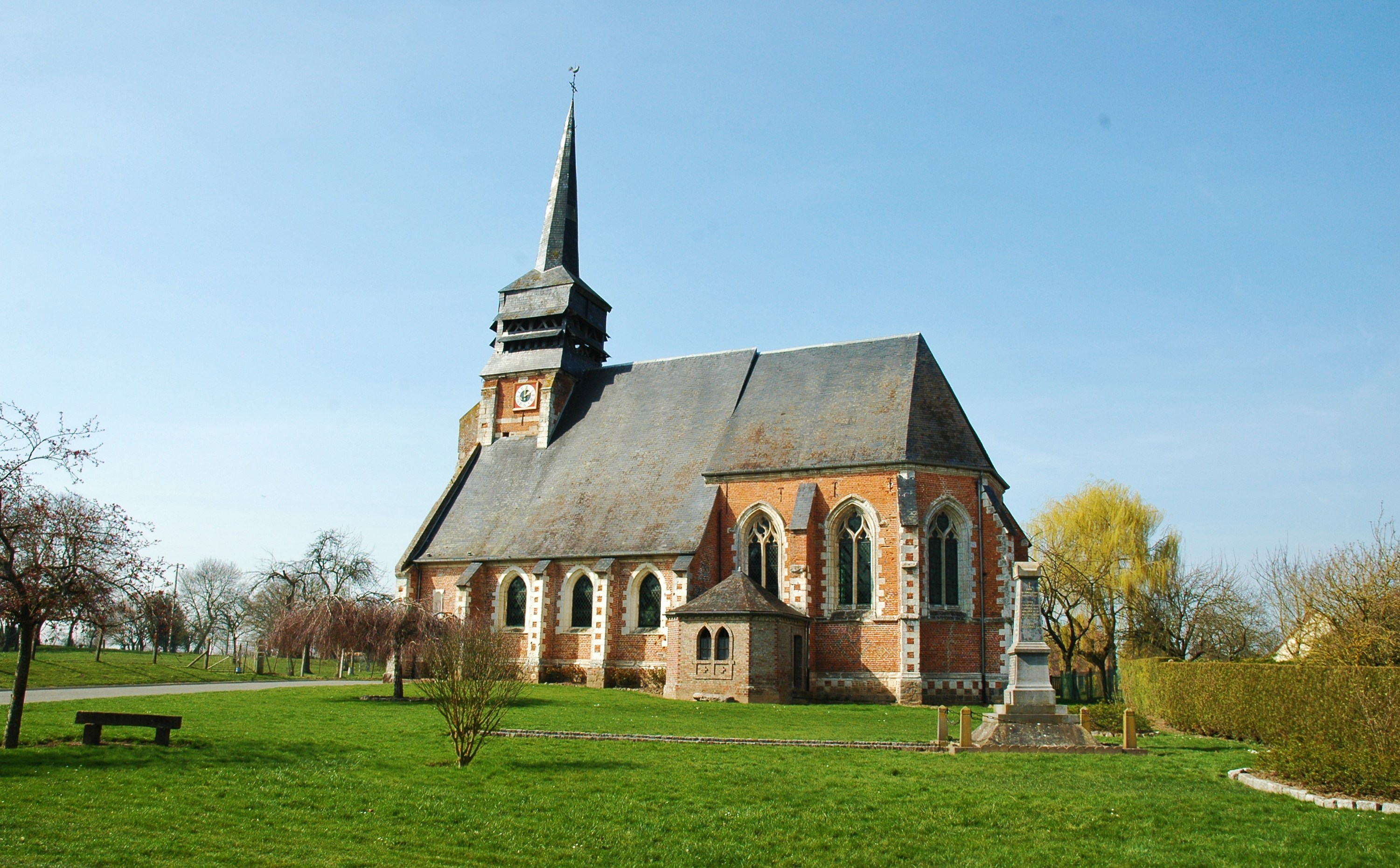 Église du XIVe siècle, Doudelainville, Somme, France